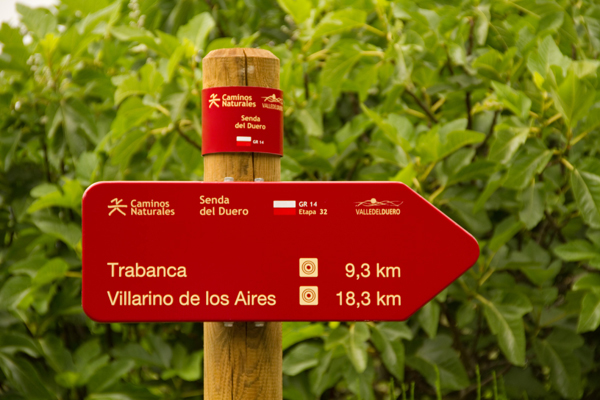 Señal del GR-14 colocada en la parte salmantina del puente de San Lorenzo, en el Parque Natural de Arribes del Duero, España.